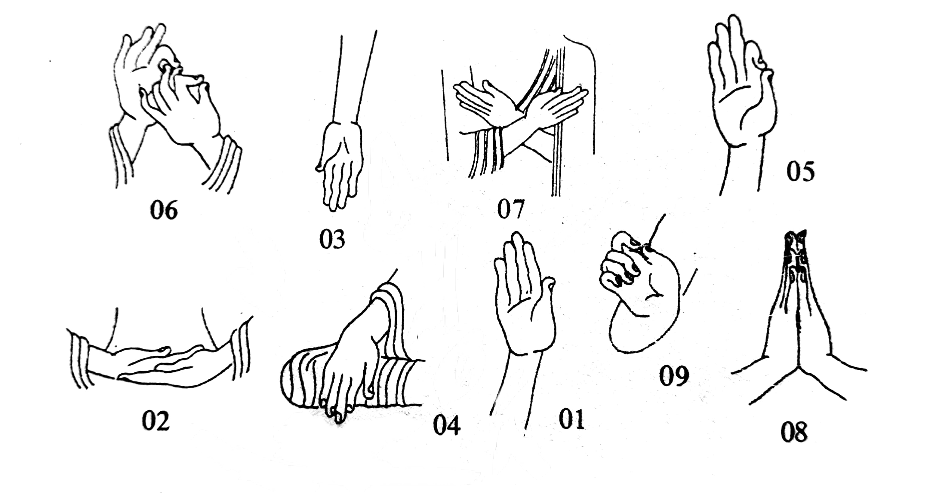 සිංහල: බුද්ධ ප‍්‍රතිමා ශෛලීන් 01. අභය මුද්‍රාව 02. ධාන්‍ය මුද්‍රාව 03. වරද මුද්‍රාව 04. භූමි ස්පර්ශ මුද්‍රාව 05. විතරක මුද්‍රාව 06. ධම්ම චක්ක මුද්‍රාව 07. පරදුඃඛ දුඃඛිත මුද්‍රාව 08. අංජලිකරණීය මුද්‍රාව 09. කටක මුද්‍රාව